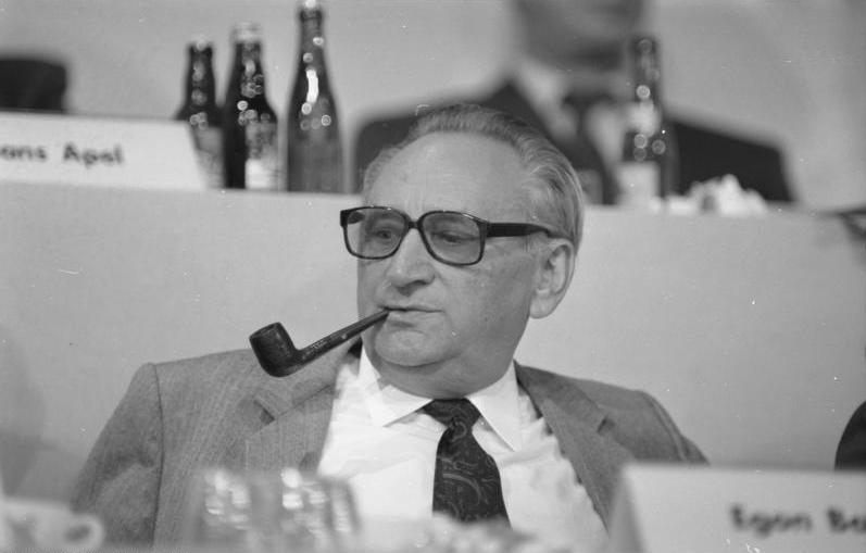 30.8.-2.9.1988 SPD-Parteitag in Münster, Halle Münsterland